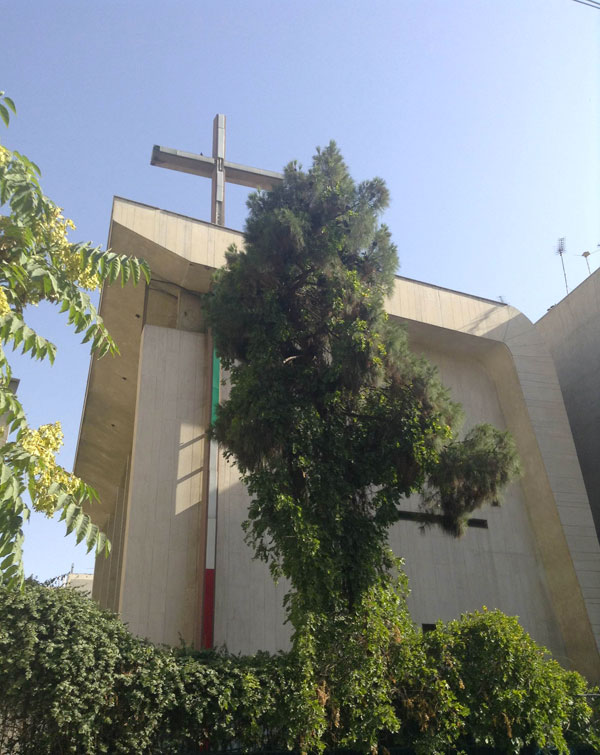 نمای بیرونی کلیسای حضرت توما (کلیسای انجیلی پروتستان متعلق به آشوریان)